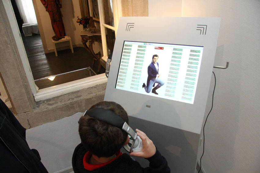 Fritz-Wunderlich-Ausstellung im Kuseler Heimatmuseum, Mediathek (2010)